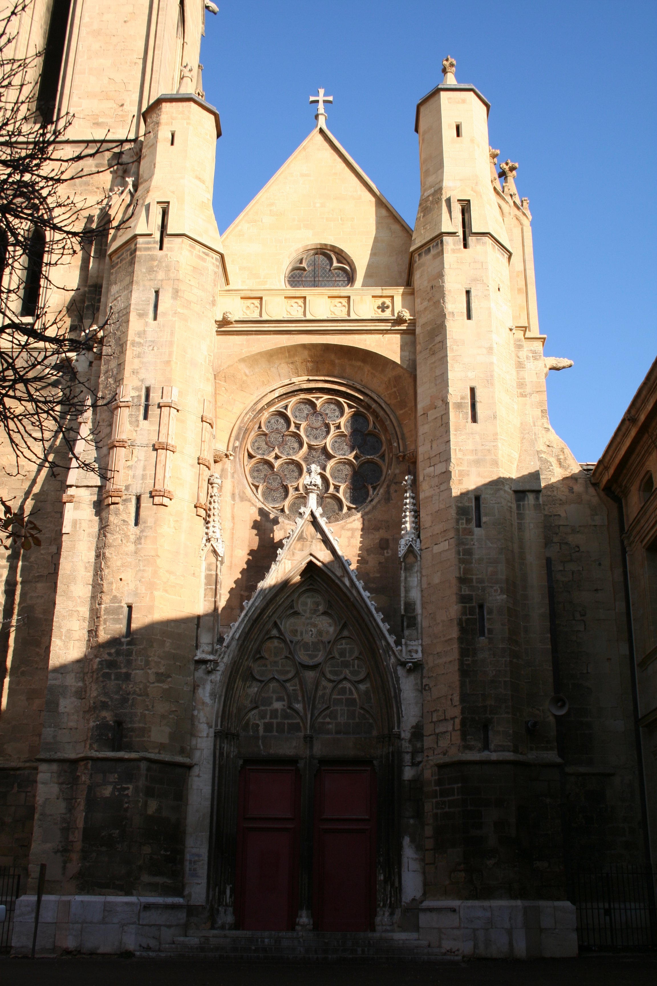 Église Saint-Jean-de-Malte, Aix-en-Provence (France).